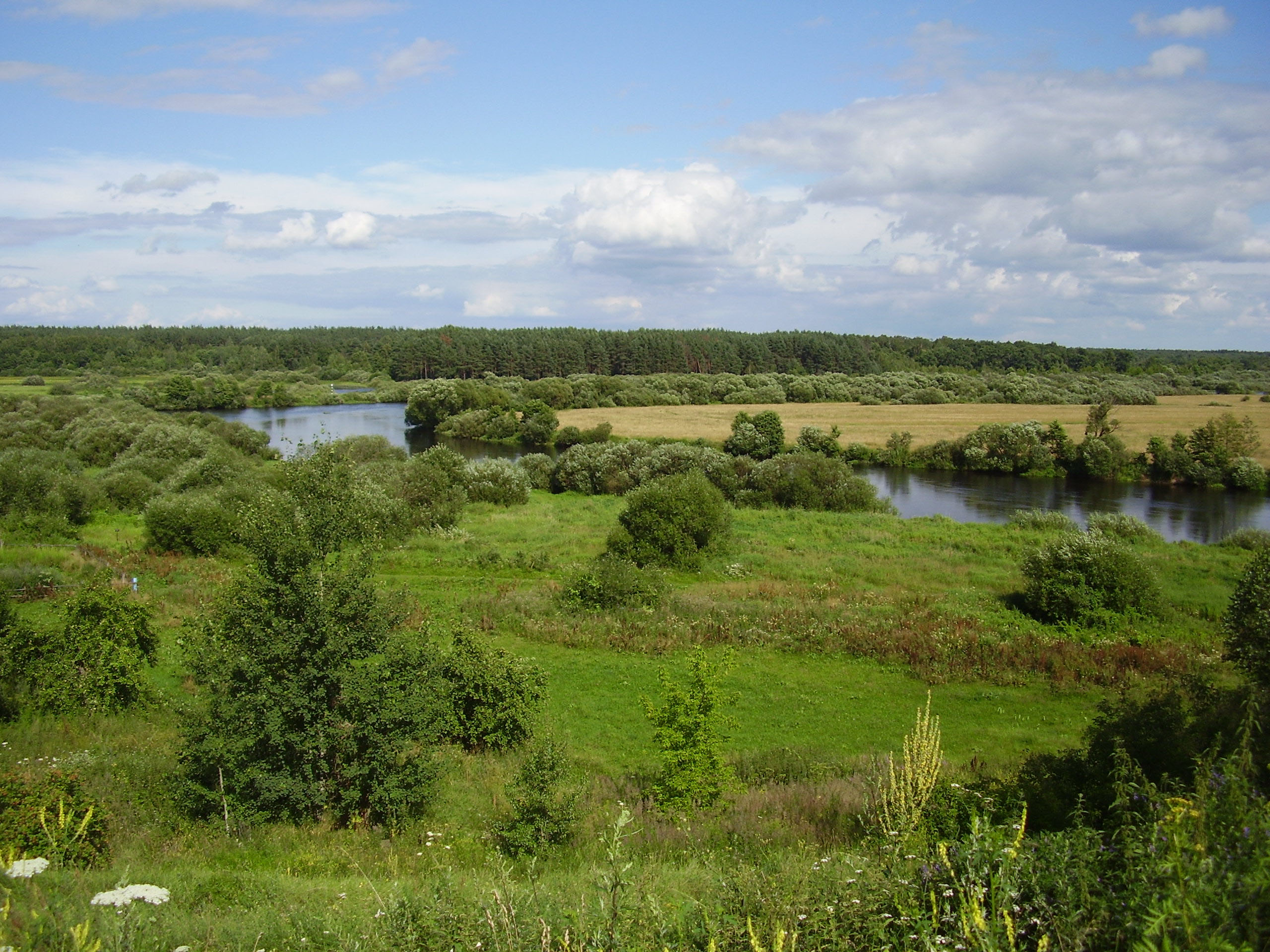 Беларуская (тарашкевіца): Гарадзішча. в. Свіслач This is a photo of Belarusian heritage monument. Reference number: 513В000588 ( WLM)